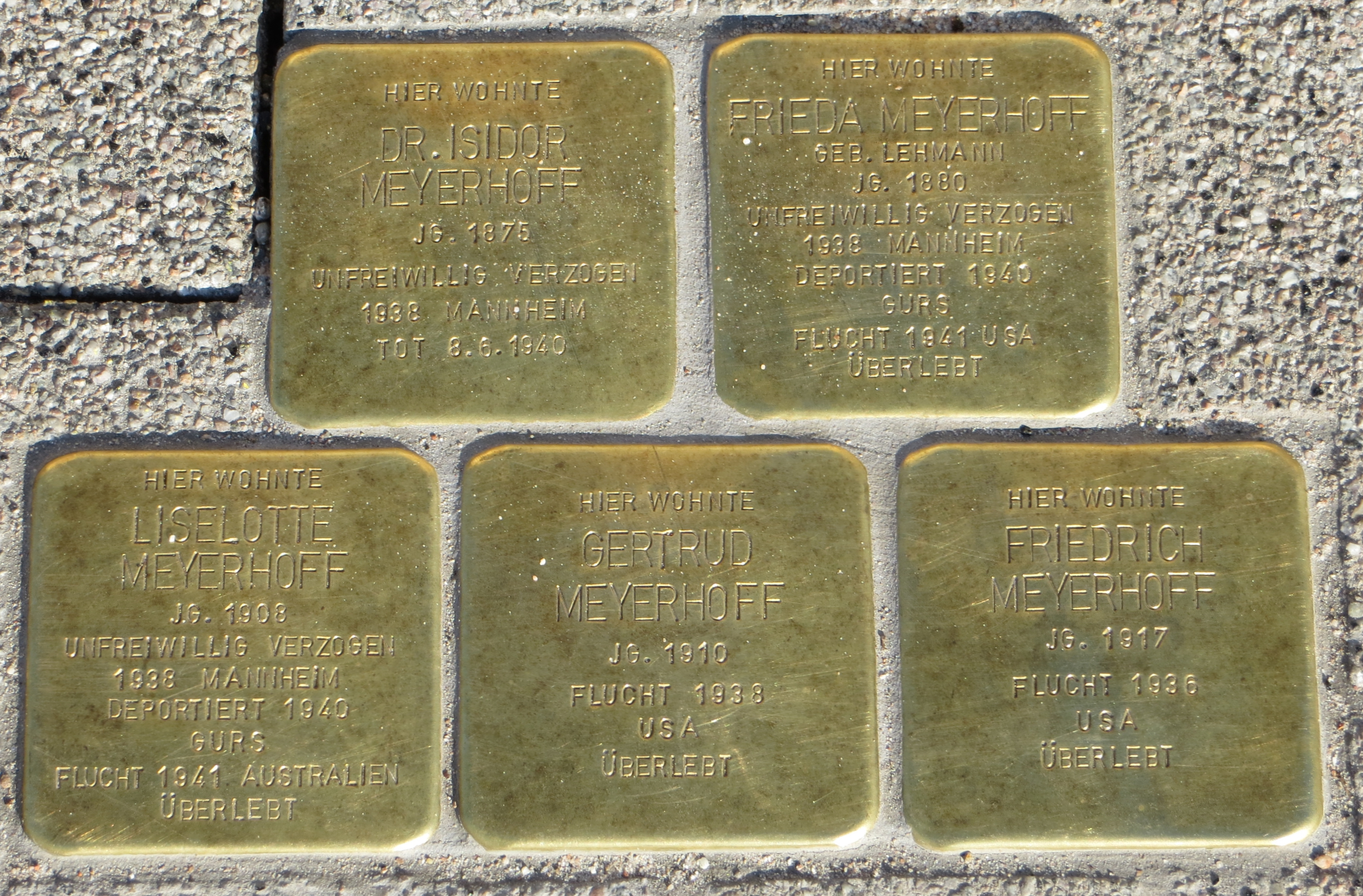 Stolpersteine für Isidor, Frieda, Lieselotte, Gertrud, und Firedrich Meyerhoff vor dem Haus Murgtalstraße 101 Gaggenau